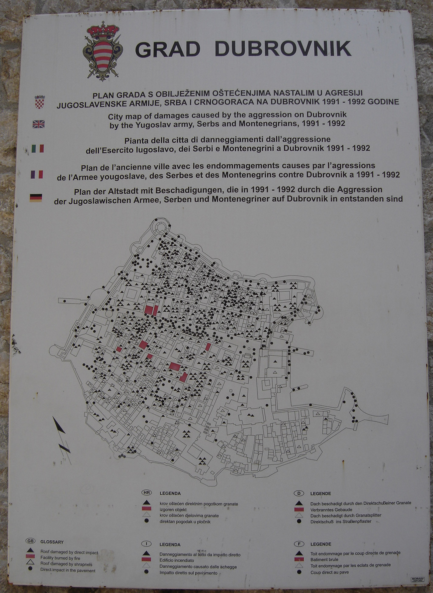 Plan des destructions de la vieille ville de Dubrovnik (photo personnelle)